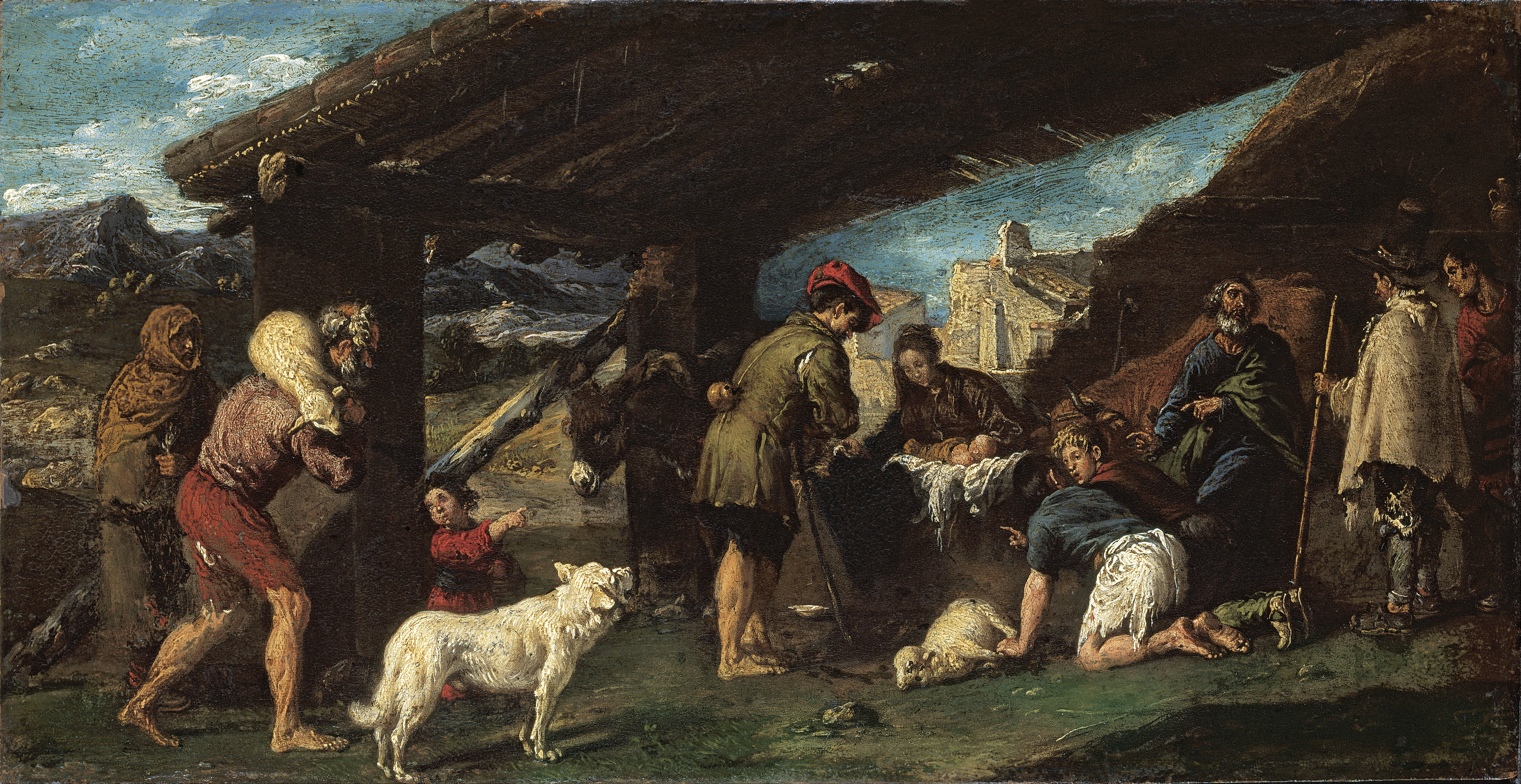 El lienzo representa el momento en que el Niño Jesús, al poco de nacer, fue adorado por un grupo de pastores.